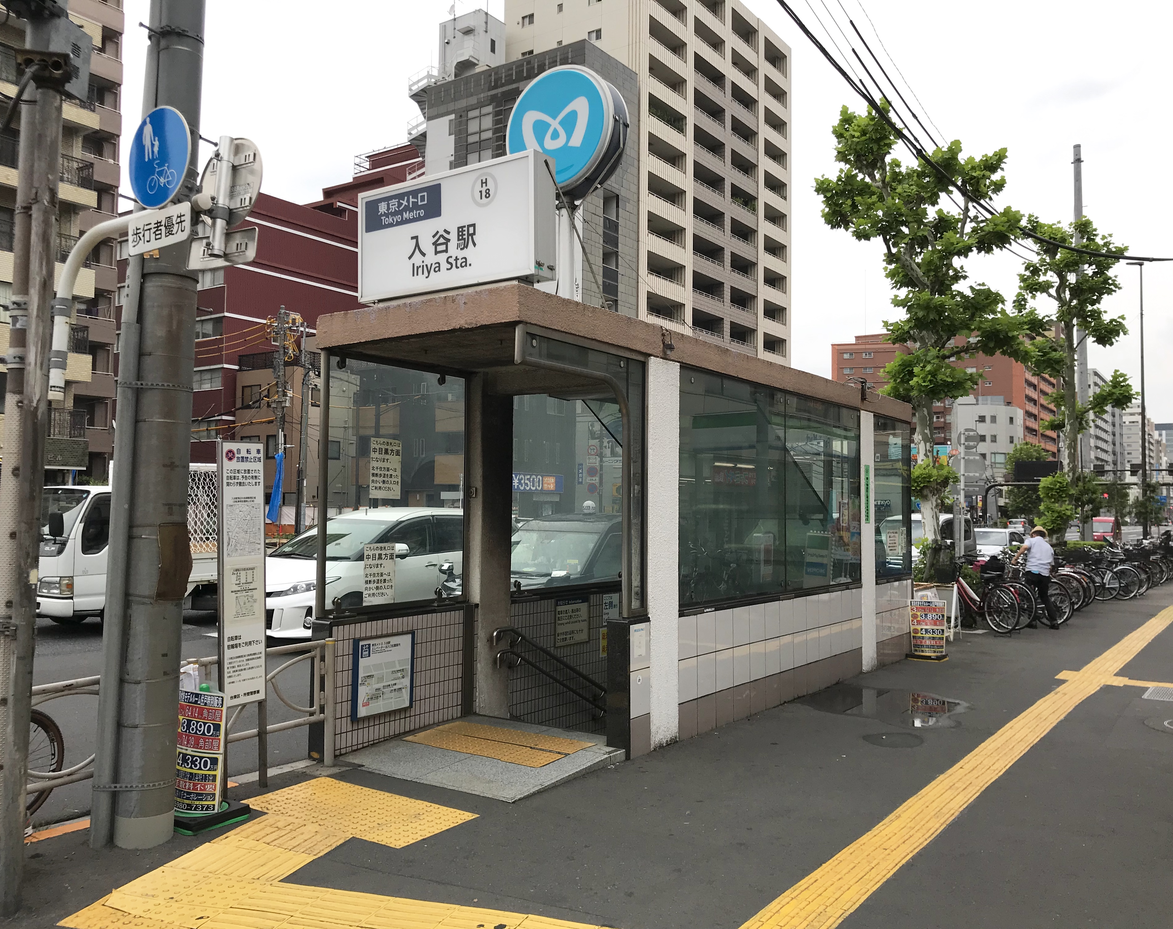 東京メトロ日比谷線入谷駅1番出入口